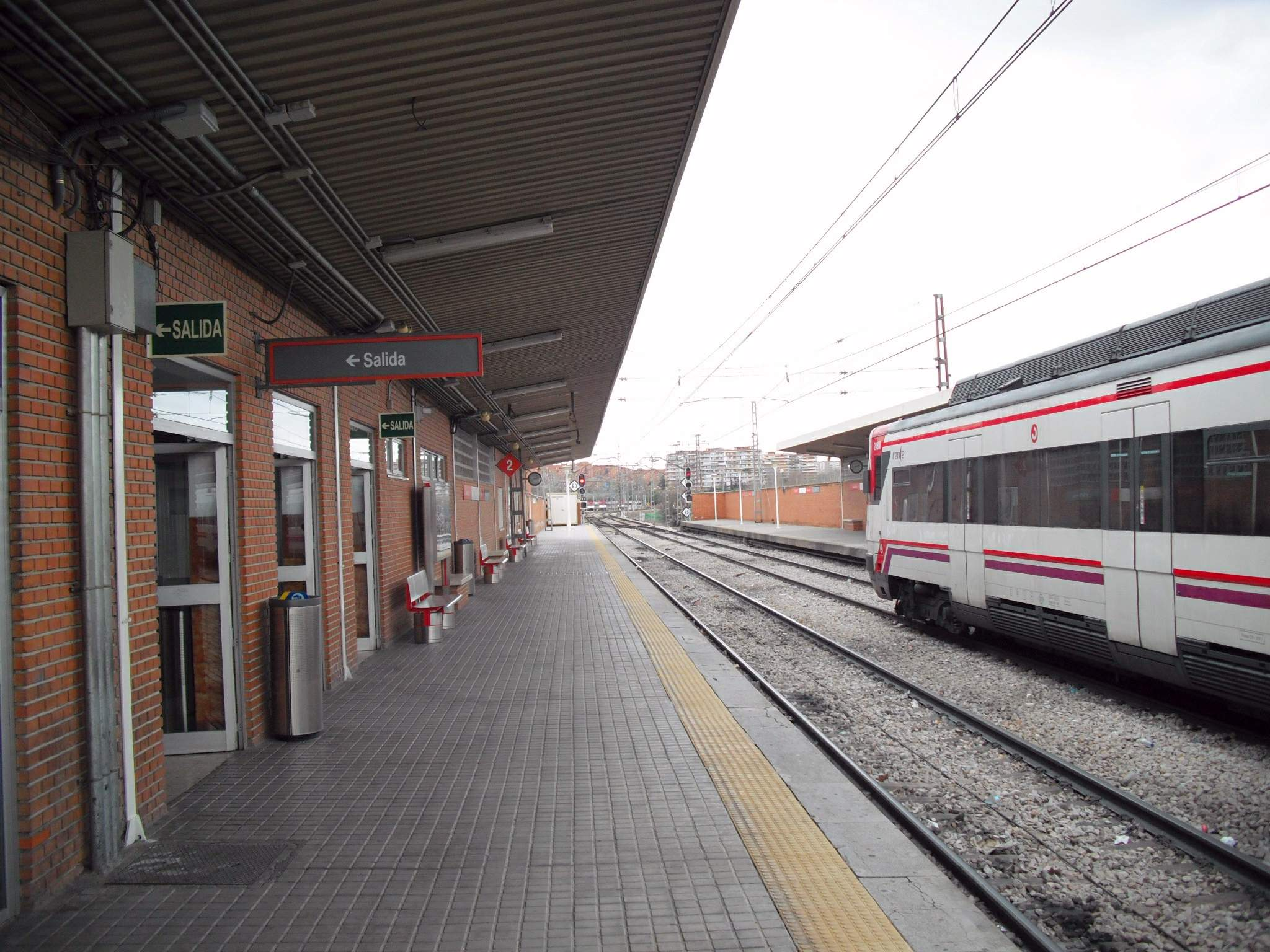 Estación de Móstoles-El Soto (Cercanías Madrid)